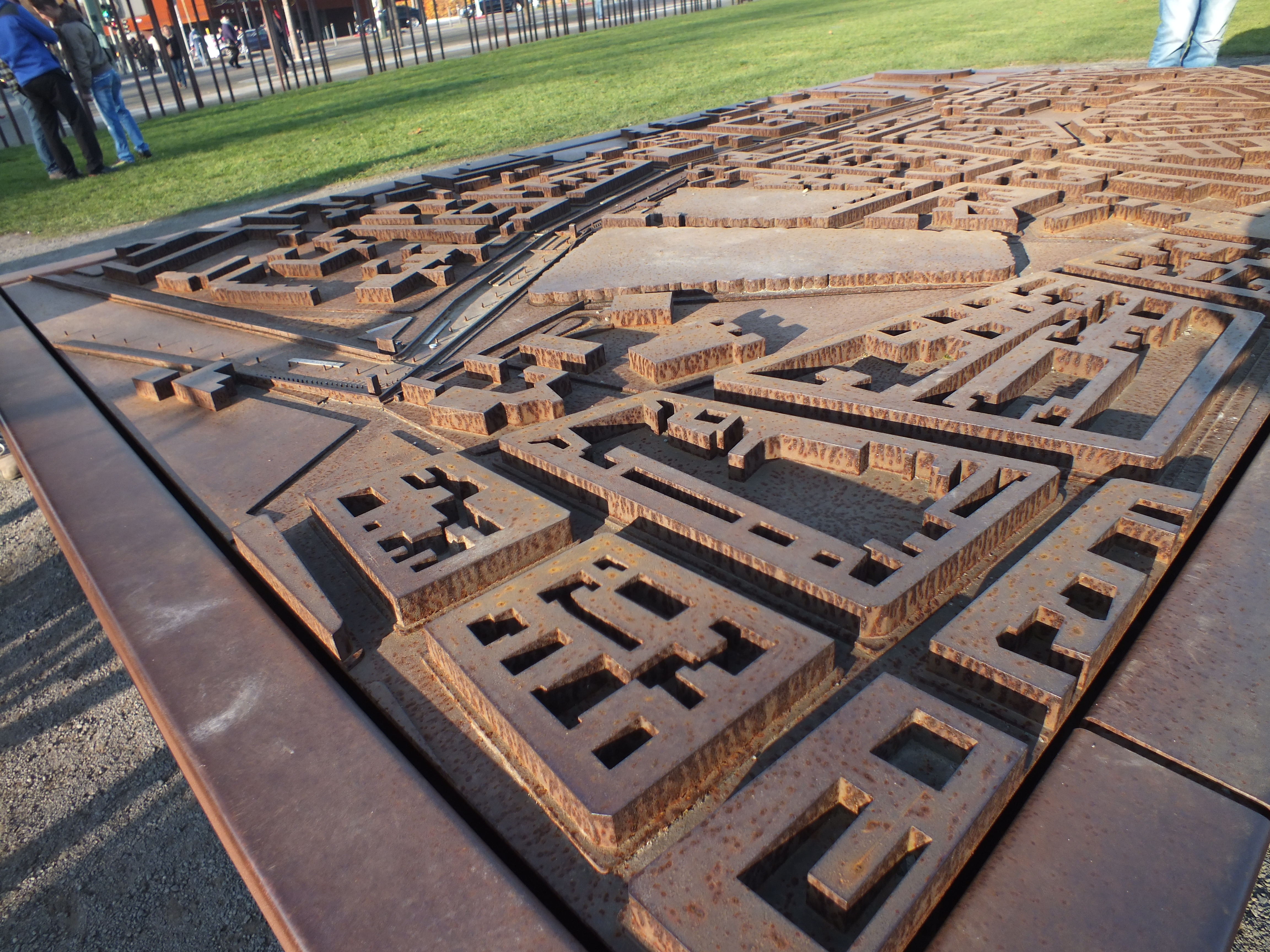 Stadtmodell aus Corten, verdeutlicht unter anderem den Verlauf der Berliner Mauer. Standort Gartenstraße Ecke Bernauer Straße